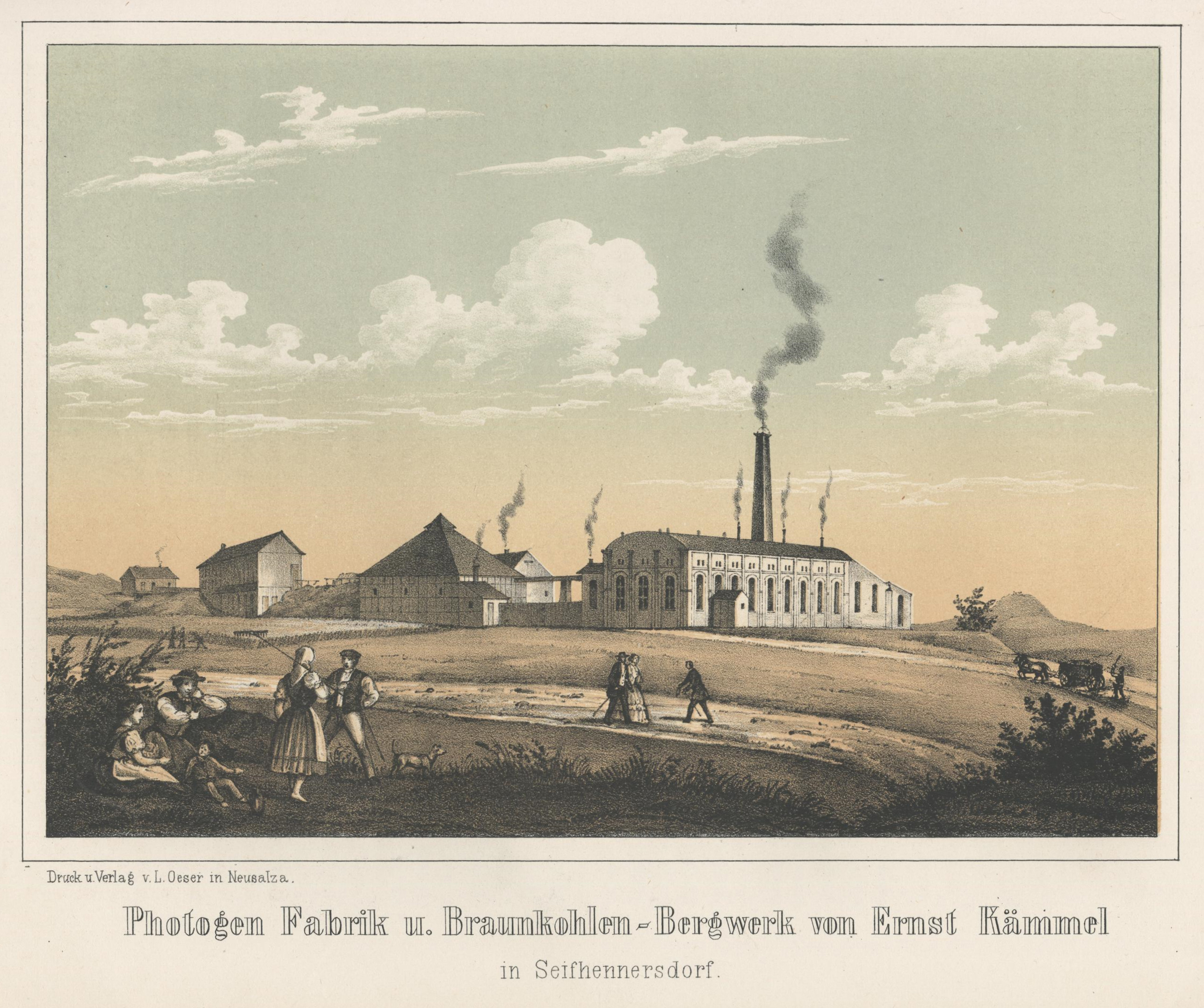 Photogen Fabrik und Braunkohlen-Bergwerk von Ernst Kämmel in Seifhennersdorf aus: Album der Sächsischen Industrie Erster Band